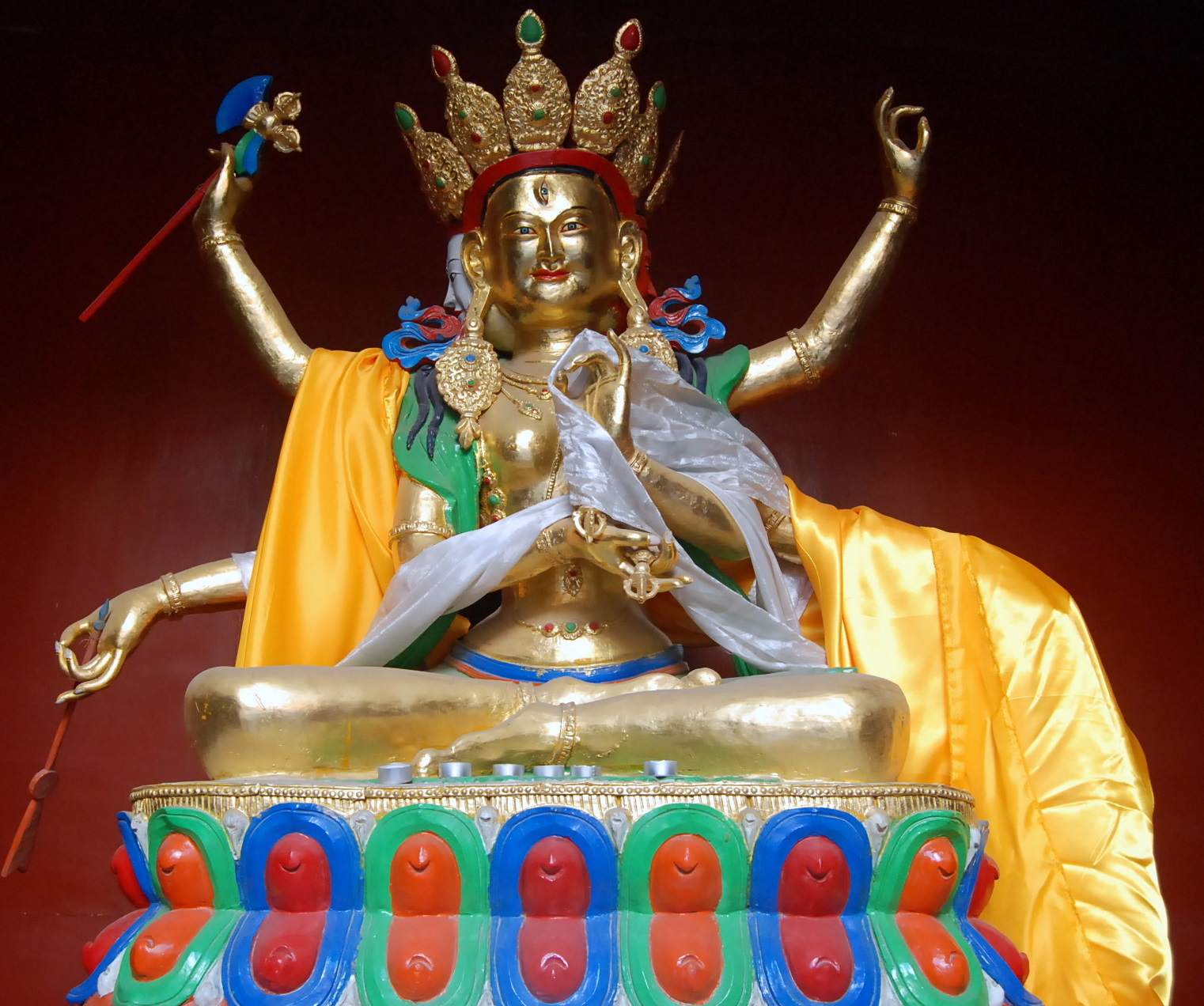 叶衣佛母像。由青海文都寺于2003年捐赠给妙应寺